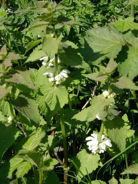 Lamium album